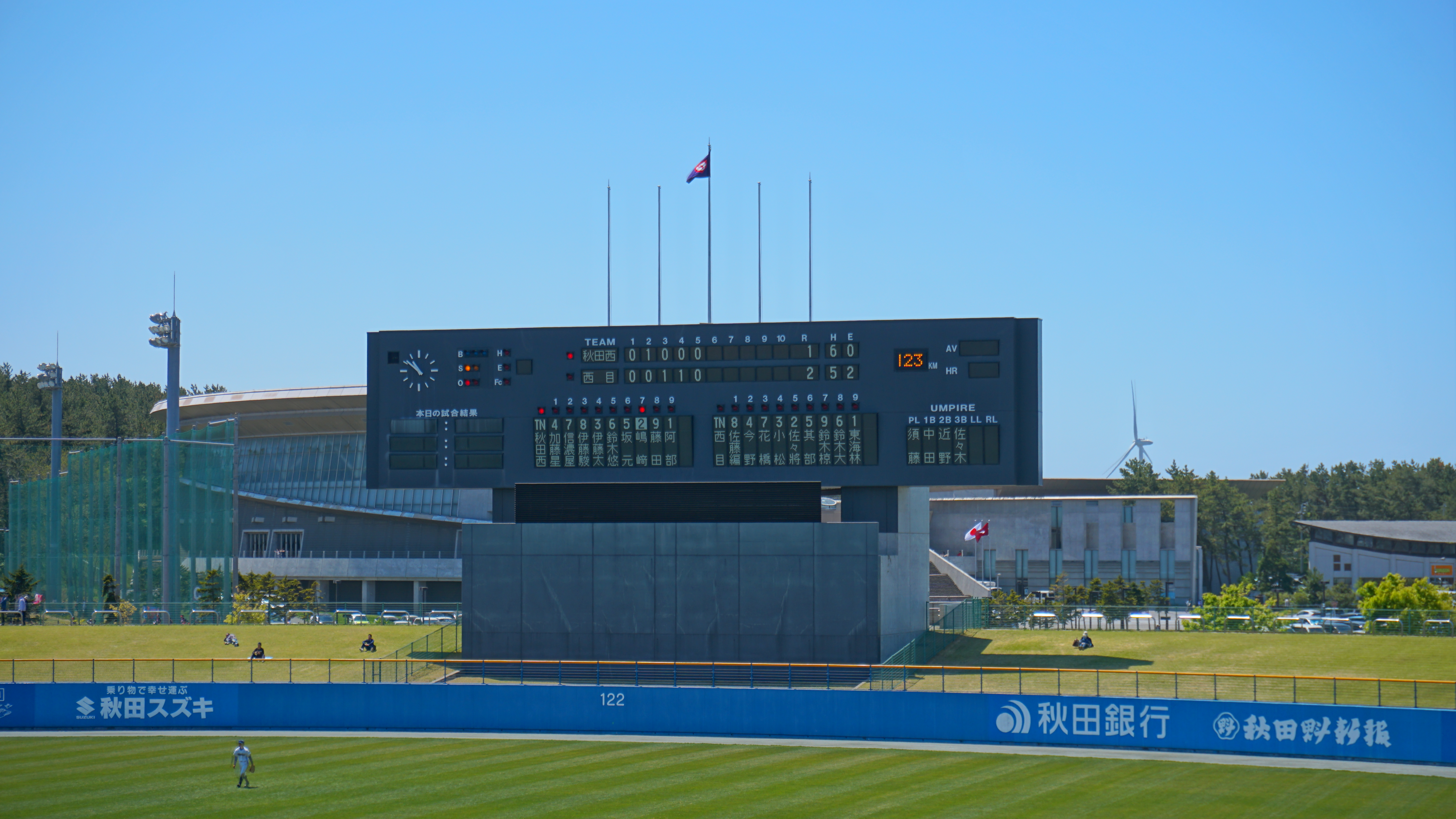 秋田県立野球場（秋田こまちスタジアム）のスコアボード。こちらは2018年の改修対象とならず、開場以来の磁気反転式のままである。